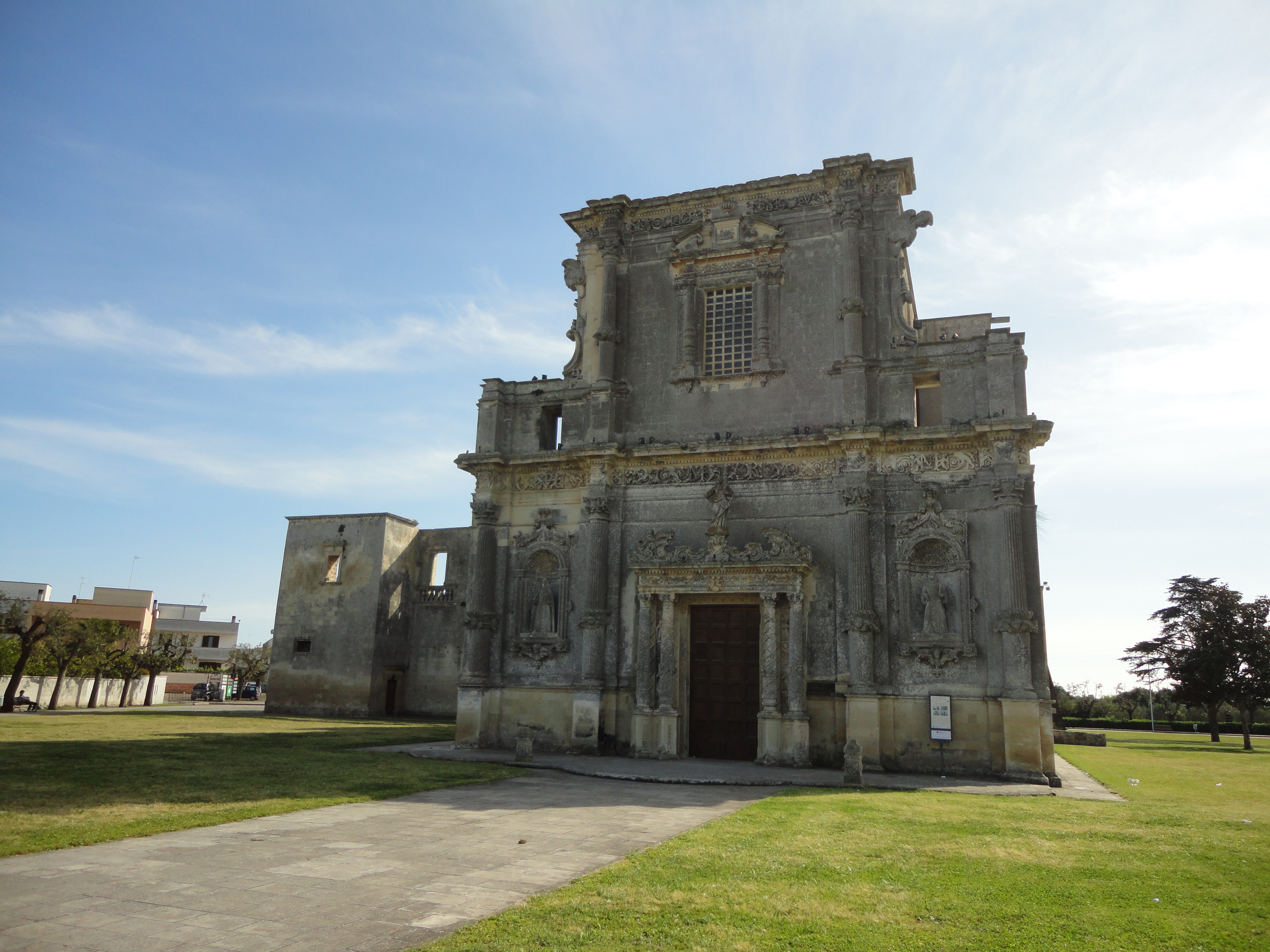 Chiesa degli Agostiniani Melpignano